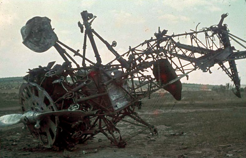 Ausgebranntes sowjetisches Flugzeug Sommer 1941 Südabschnitt der Ostfront Information added by Wikimedia users.